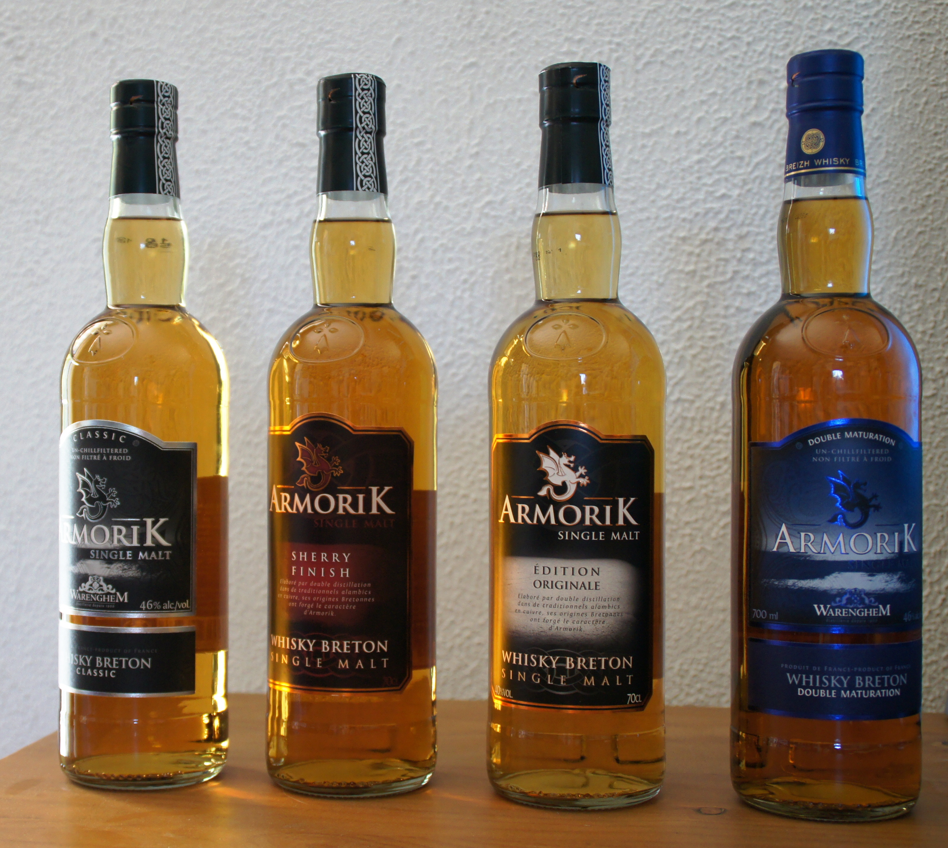 Gammes des 4 whisky Armorik single malt